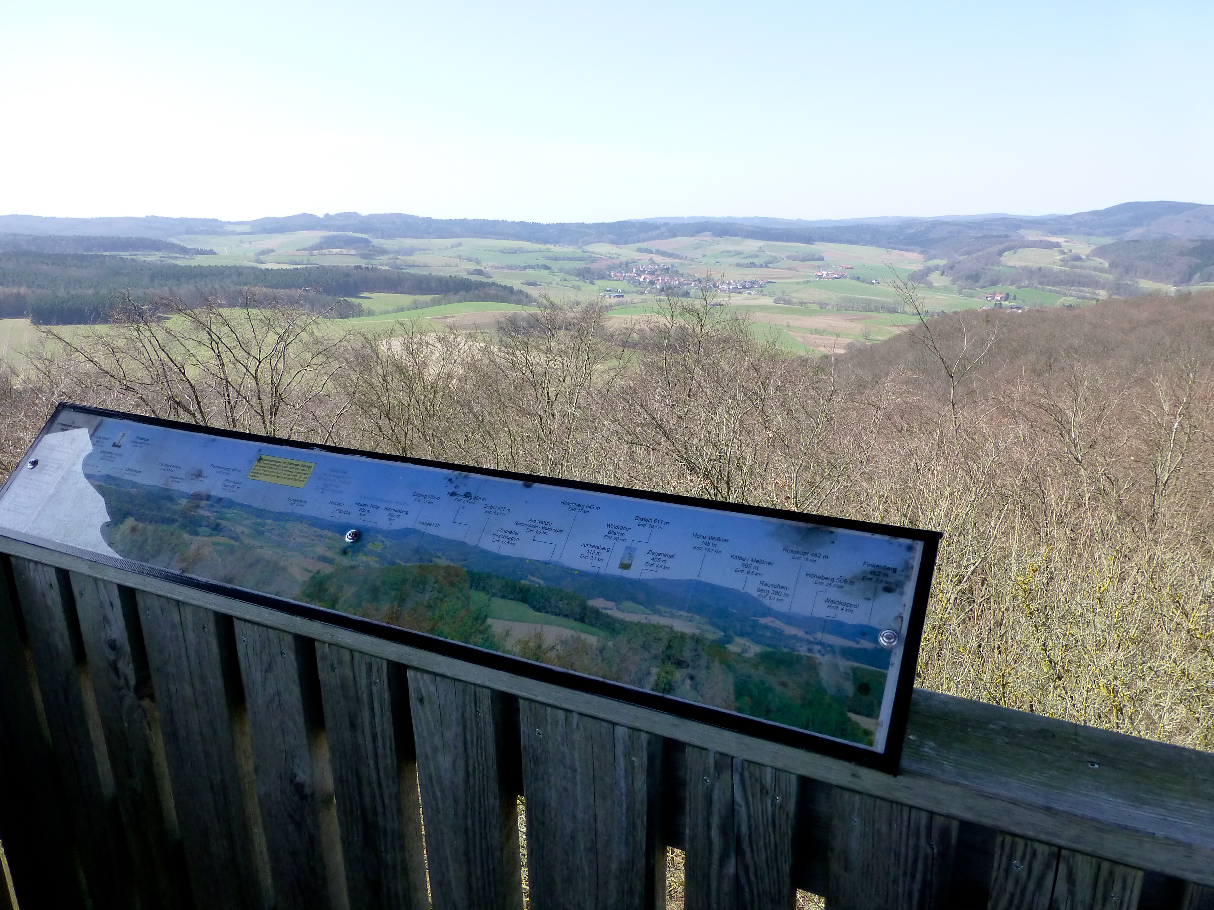 Aussichtsturm Ziegenküppel; Aussichtsplattform mit Orientierungstafel; Blick nach Westen in Richtung Schemmern; am rechten Bildrand der Eisberg